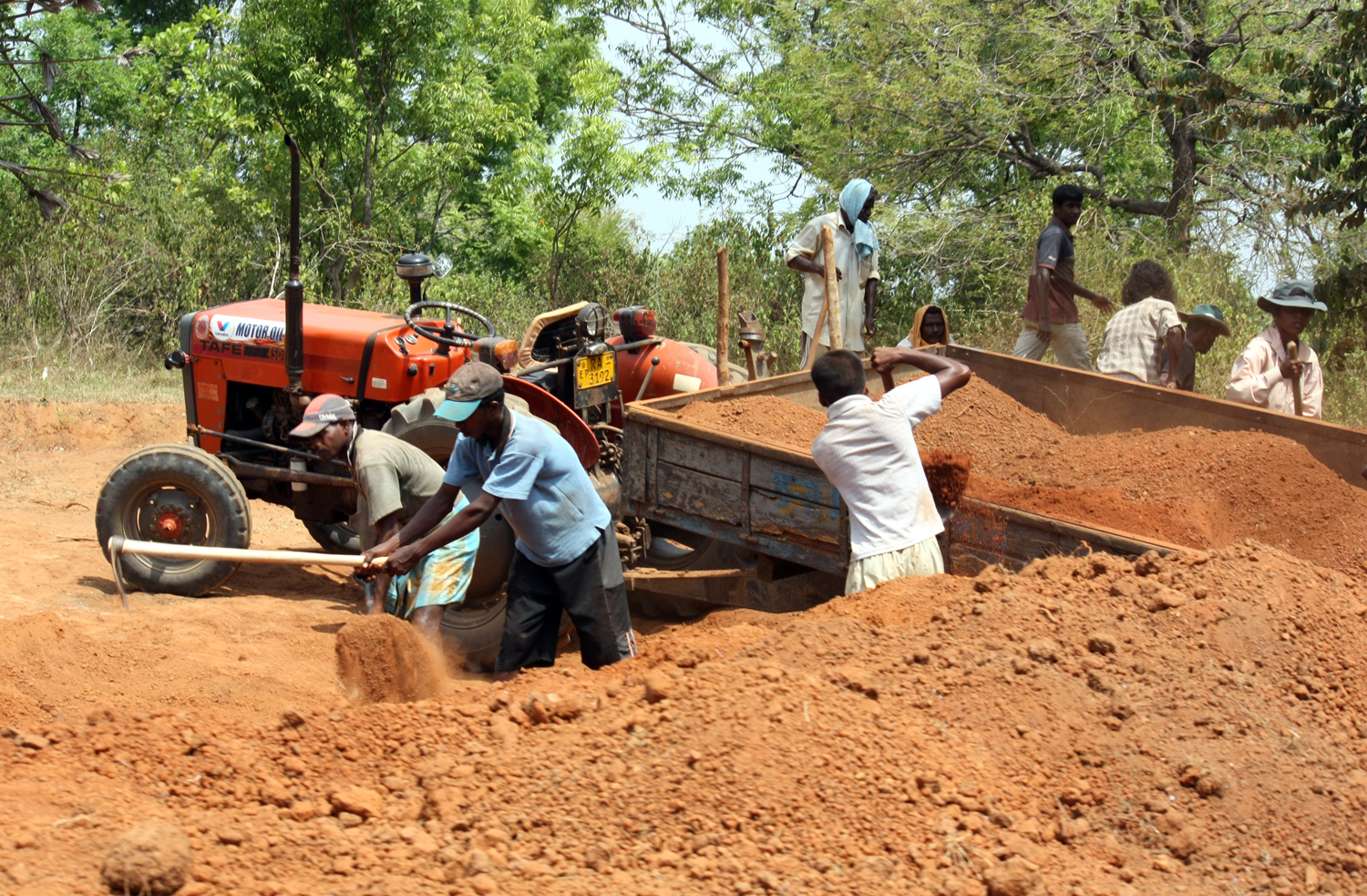 சரளைக் கற்கள் கொண்டு அமைக்கப்படும் சாலைக்கான அகழ்வு வேலை